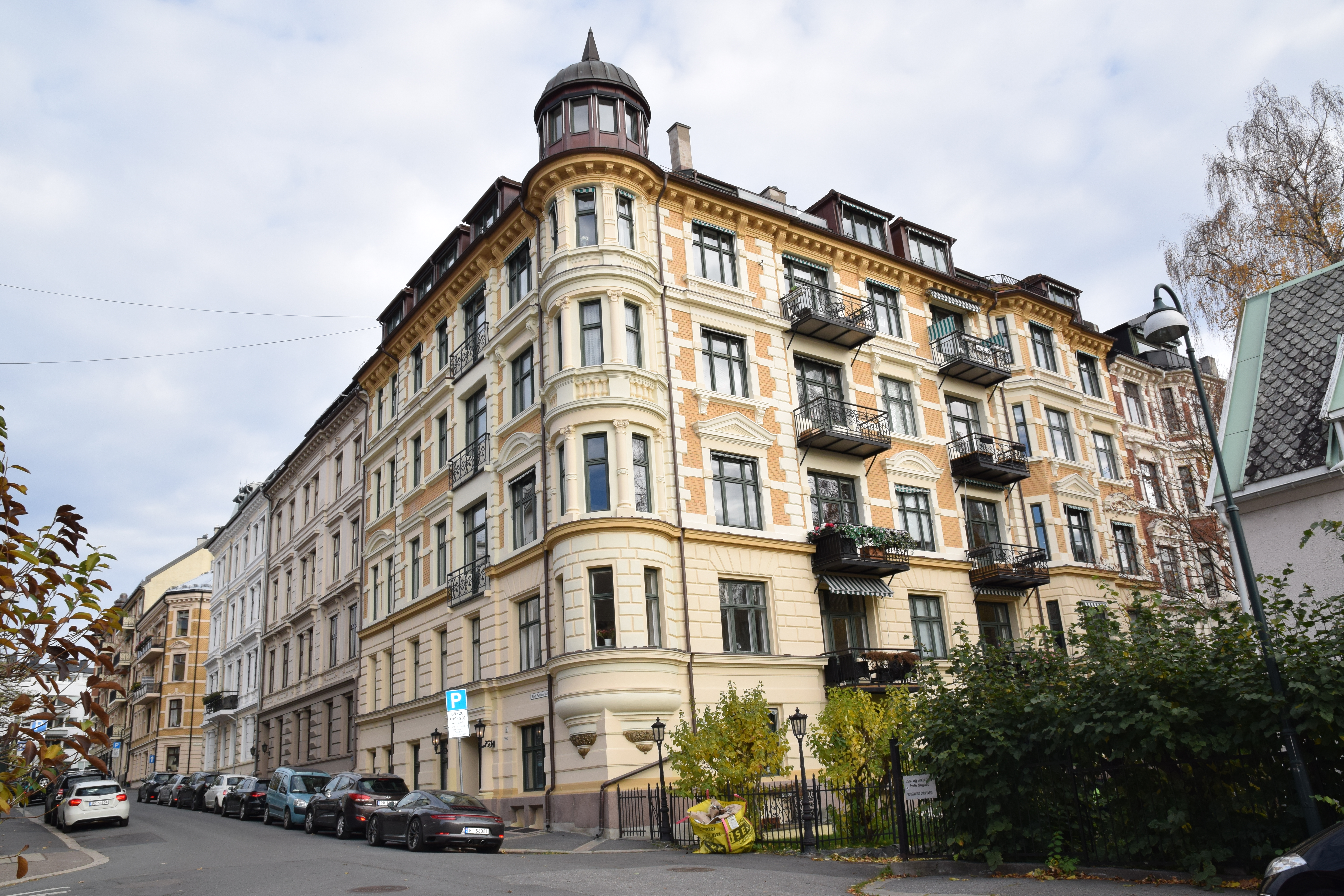 Svoldergata 9, Skillebekk